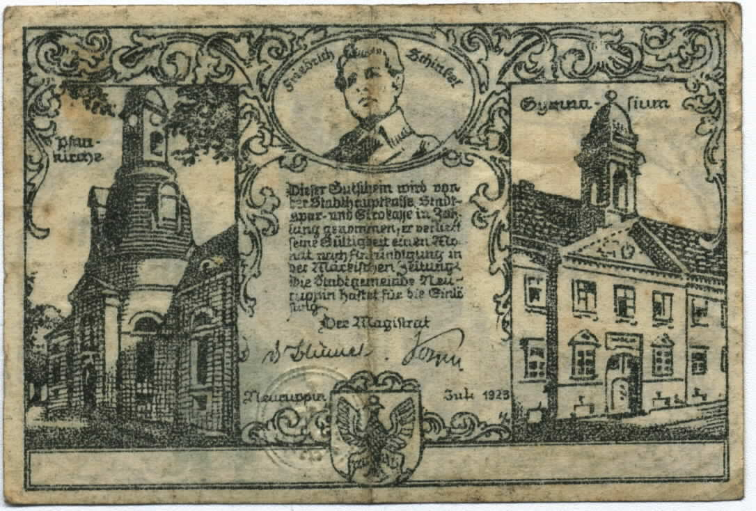 Rückseite eines Notgeldscheins der Stadt Neuruppin, Wert "1 Million Mark" aus dem Jahr 1923 mit Darstellung der Pfarrkirche und des Gymnasiums.